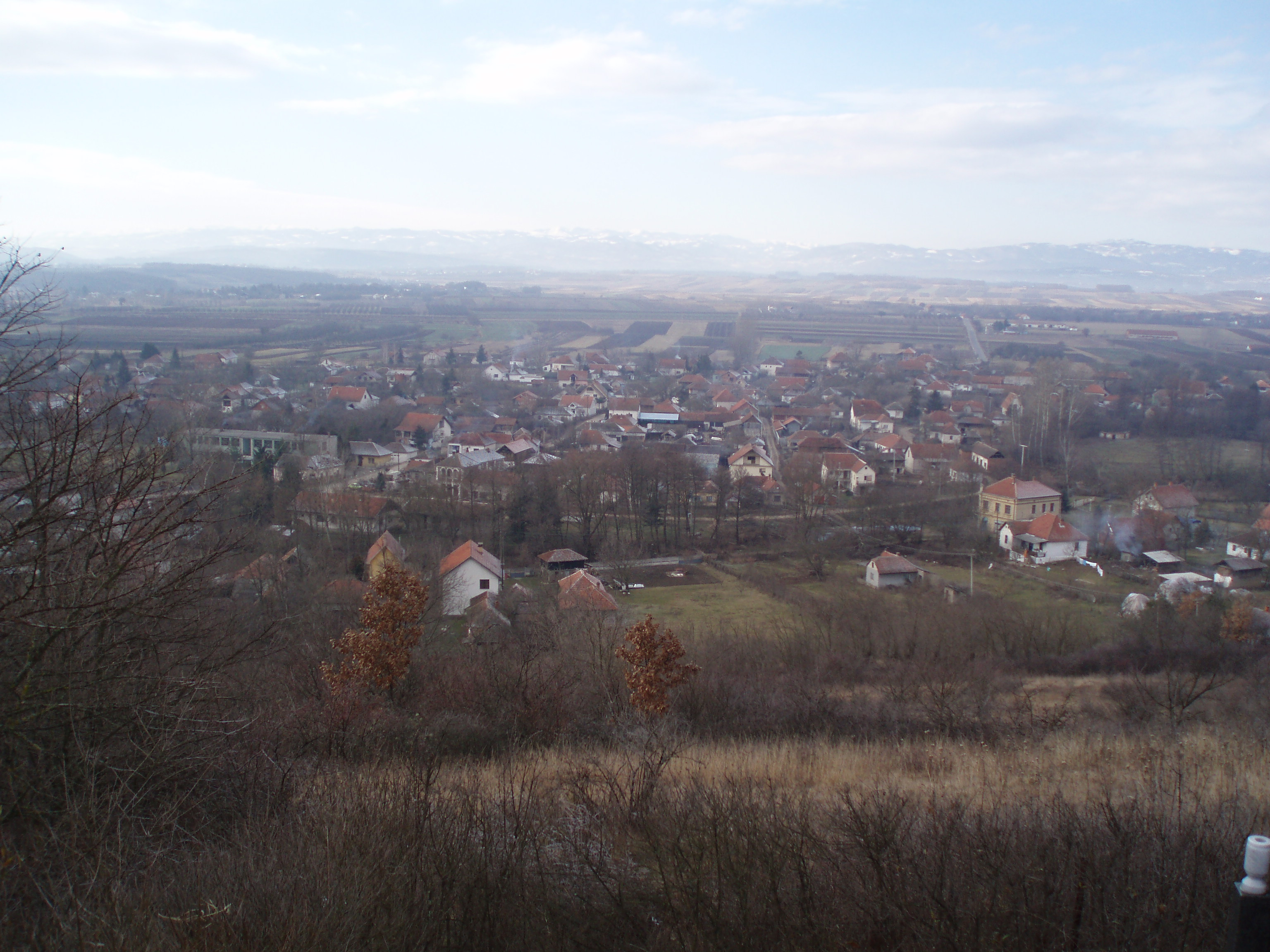 Gornja Draguša, un village de Serbie situé dans la municipalité de Blace (district de Toplica)